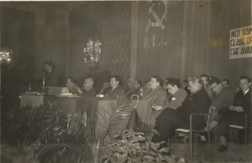 Assemblea di partito.